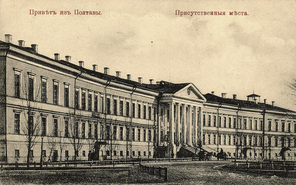 Будинок_Полтавських_губернських_присутственних_місць.jpg: Будинок Полтавських губернських присутственних місць, початок 20 століття